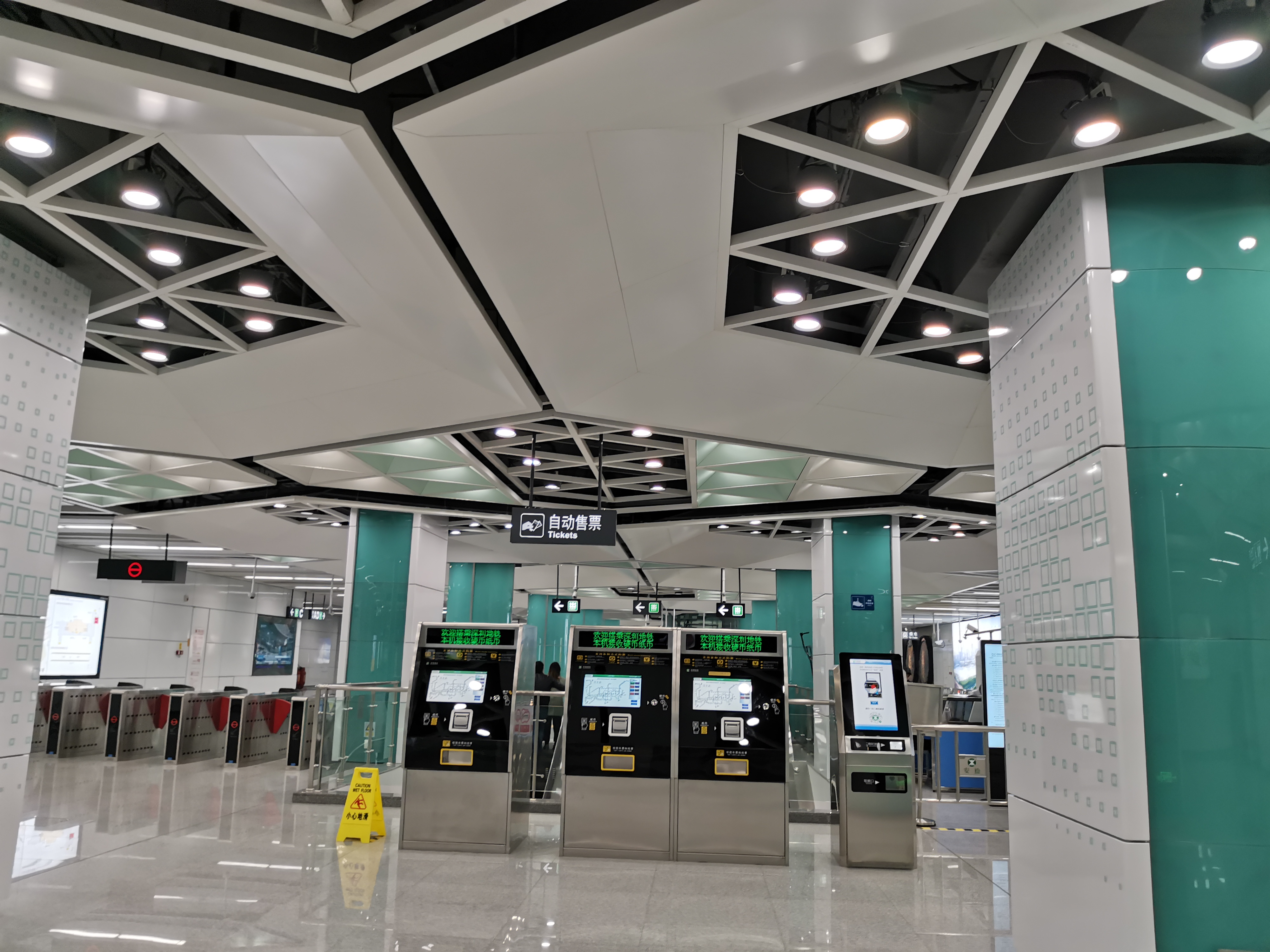 粤海门站站厅